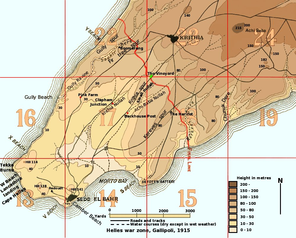 Map of the Helles war zone of Gallipoli, 1915. Turkish names and equivalent on map : Alçitepe = Krithia Aytepe = Hill 138 Delile Sirti = Fir Tree Spur Karacaoğlu Tepe = Hill 114 Kemal Bey Tepe = Haricot Kanli Dere = Achi Baba Nullah Kirte Dere = Krithia Nullah = Krithia Valley Sotiri Çiftliği = Pink Farm Zığın Dere = Gulley Ravine